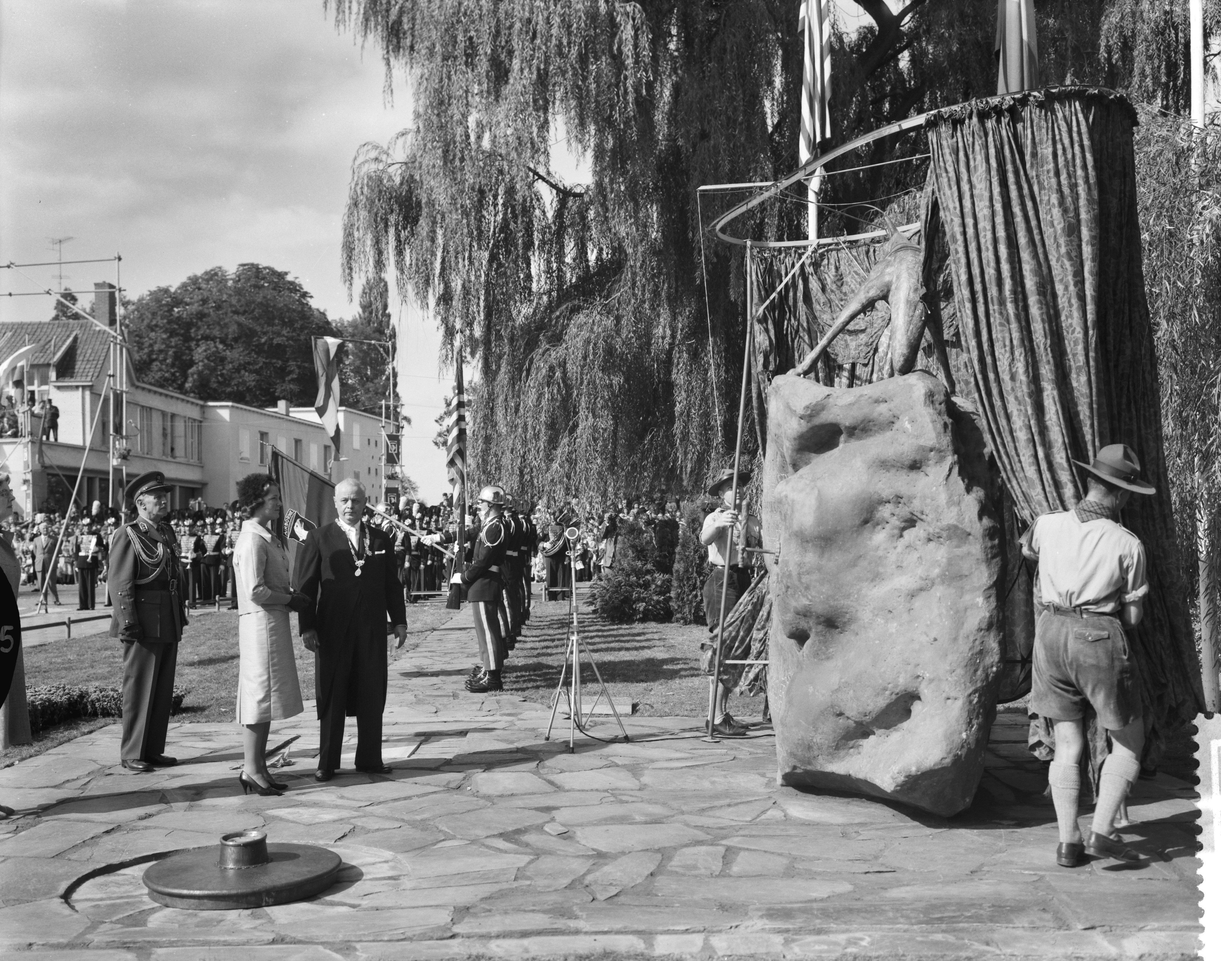 Collectie / Archief : Fotocollectie Anefo Reportage / Serie : [ onbekend ] Beschrijving : Onthulling van het monument ter ere van de 101ste Airborne Division te Veghel, prinses Irene onthult het monument Datum : 17 september 1959 Locatie : Noord-Brabant, Veghel Trefwoorden : monumenten, onthullingen, oorlogsmonumenten, prinsessen Persoonsnaam : Irene (prinses Nederland) Fotograaf : Pot, Harry / Anefo, [onbekend] Auteursrechthebbende : Nationaal Archief Materiaalsoort : Negatief (zwart/wit) Nummer archiefinventaris : bekijk toegang 2.24.01.04 Bestanddeelnummer : 910-6799